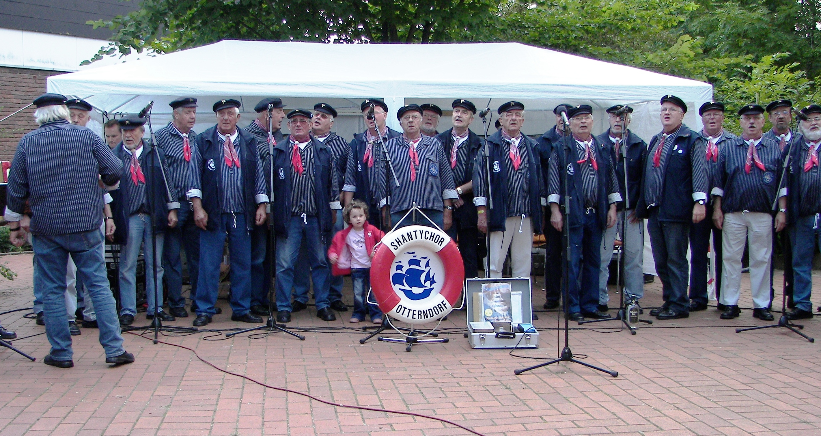 Der shanty is een wonder mooi meisje en ...........